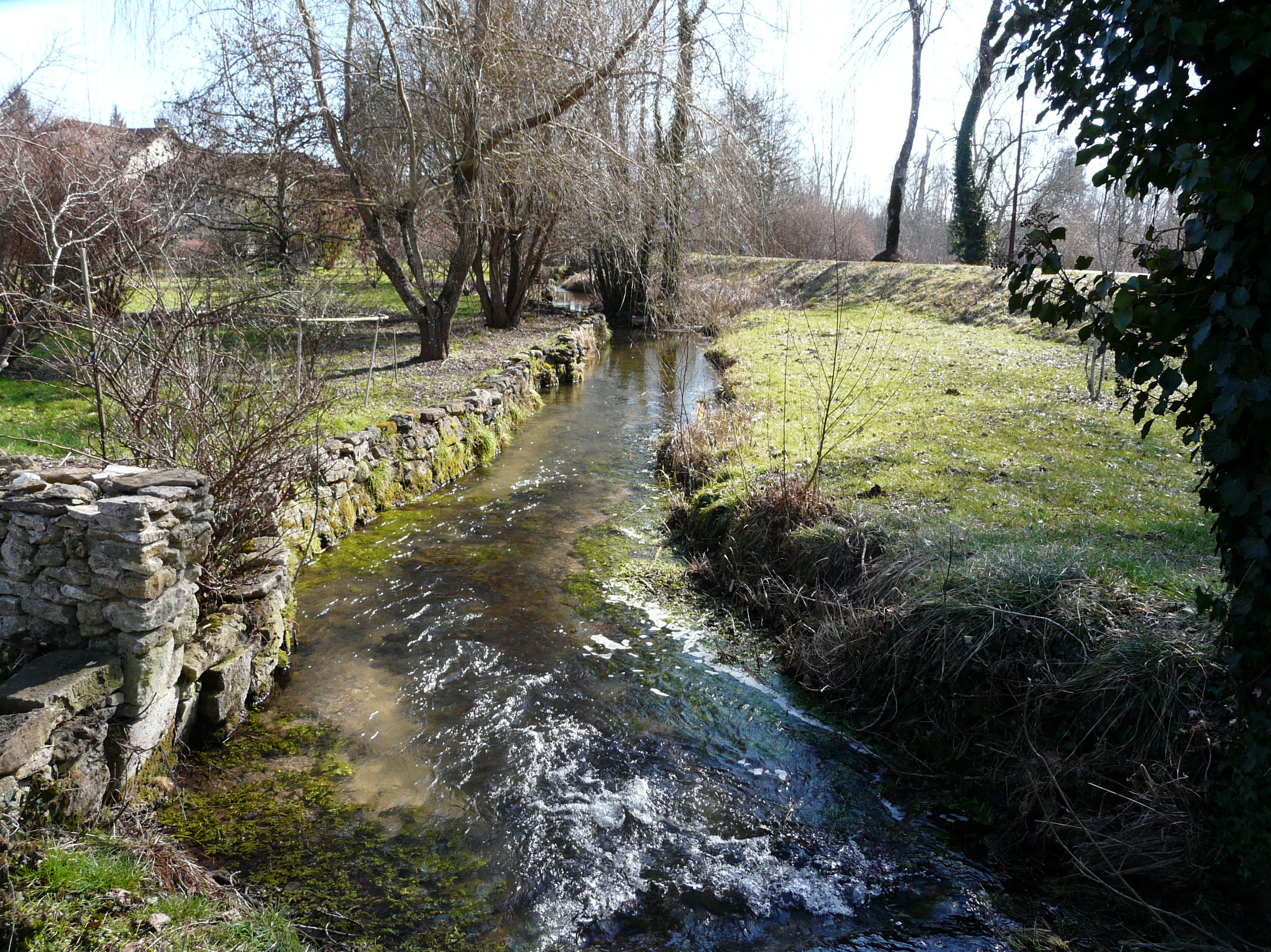 La Julie en aval du lavoir de Saint-Just, Dordogne, France.